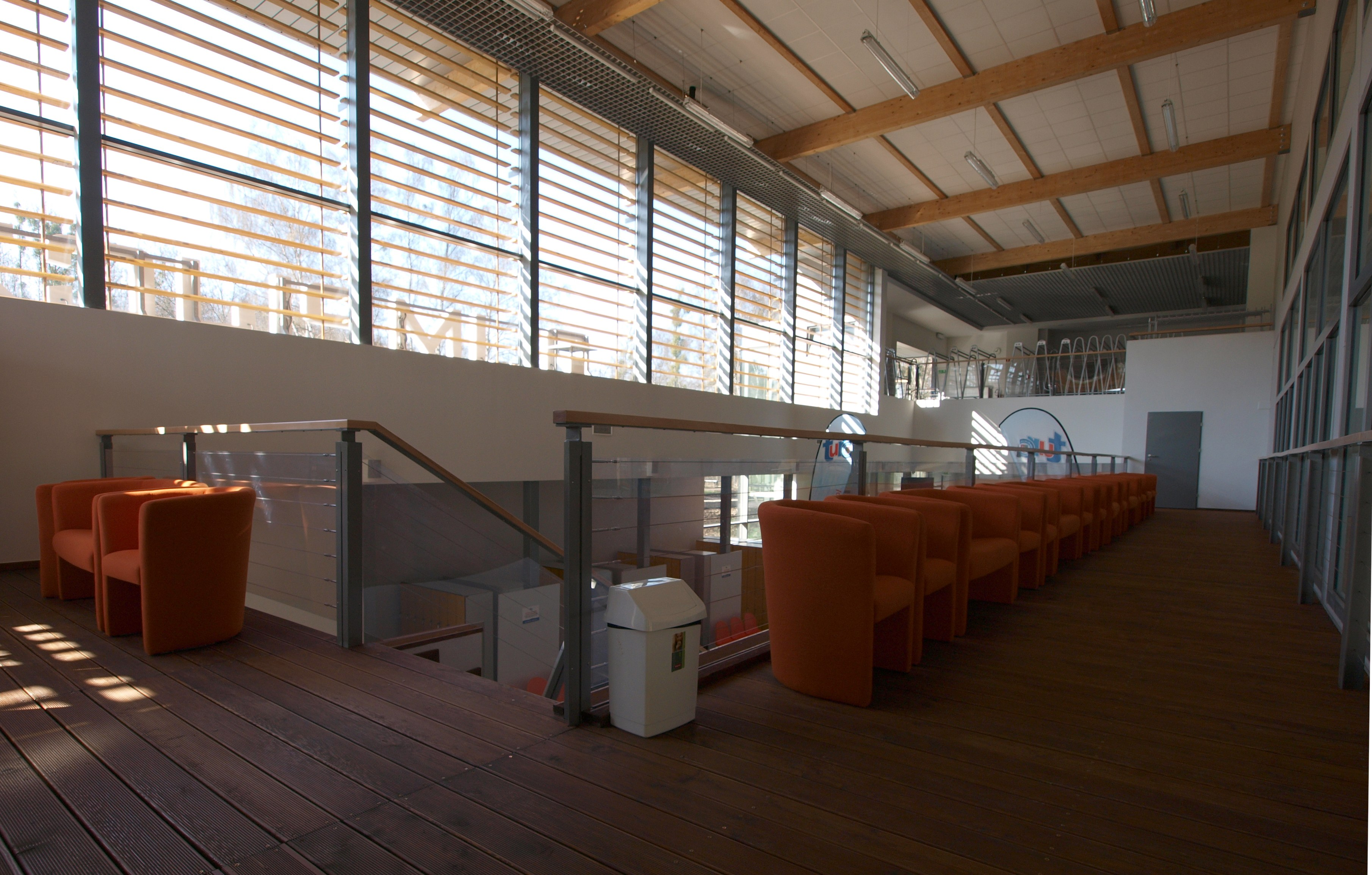 Kryta pływalnia "Olimpijczyk" w Gliwicach. Antresola.